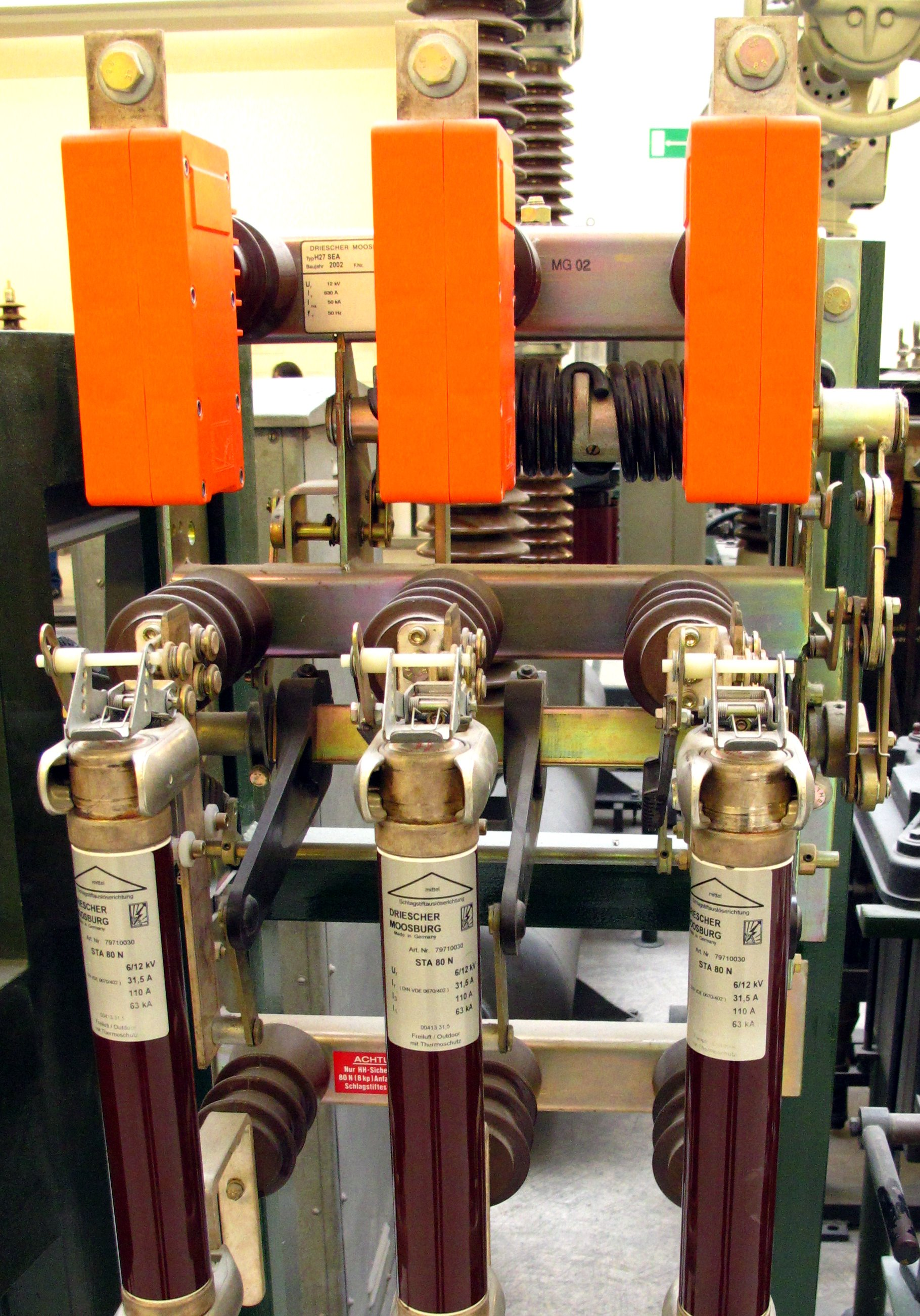 Lasttrennschalter Typ H27 SEA für Innenraummontage mit Schmelzsicherungen für 12 kV und 400 A und Federkraftspeicher zum Schnellen Ein- und Ausschalten. Hersteller: Elektrotechnische Werke Fritz Driescher & Söhne, 2002